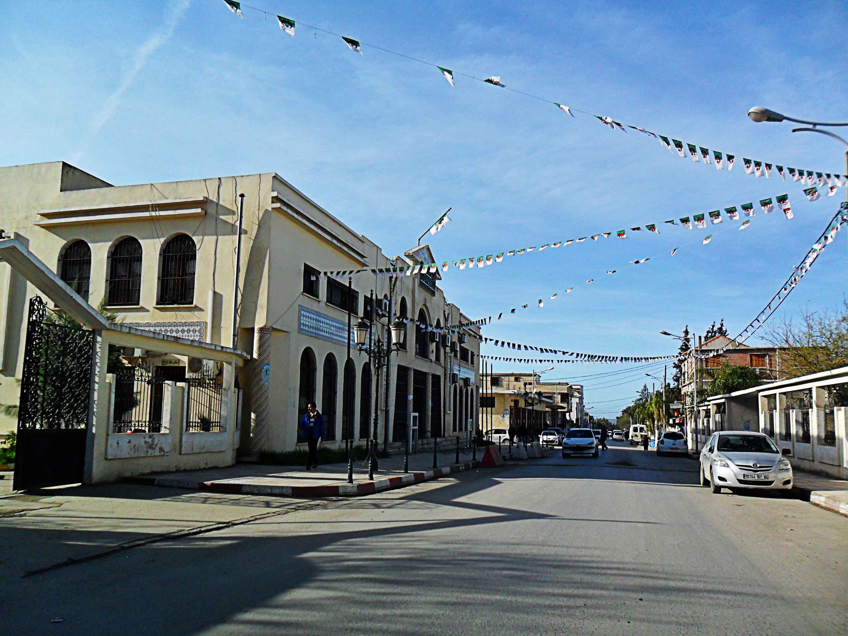 Beni Mered - la mairie